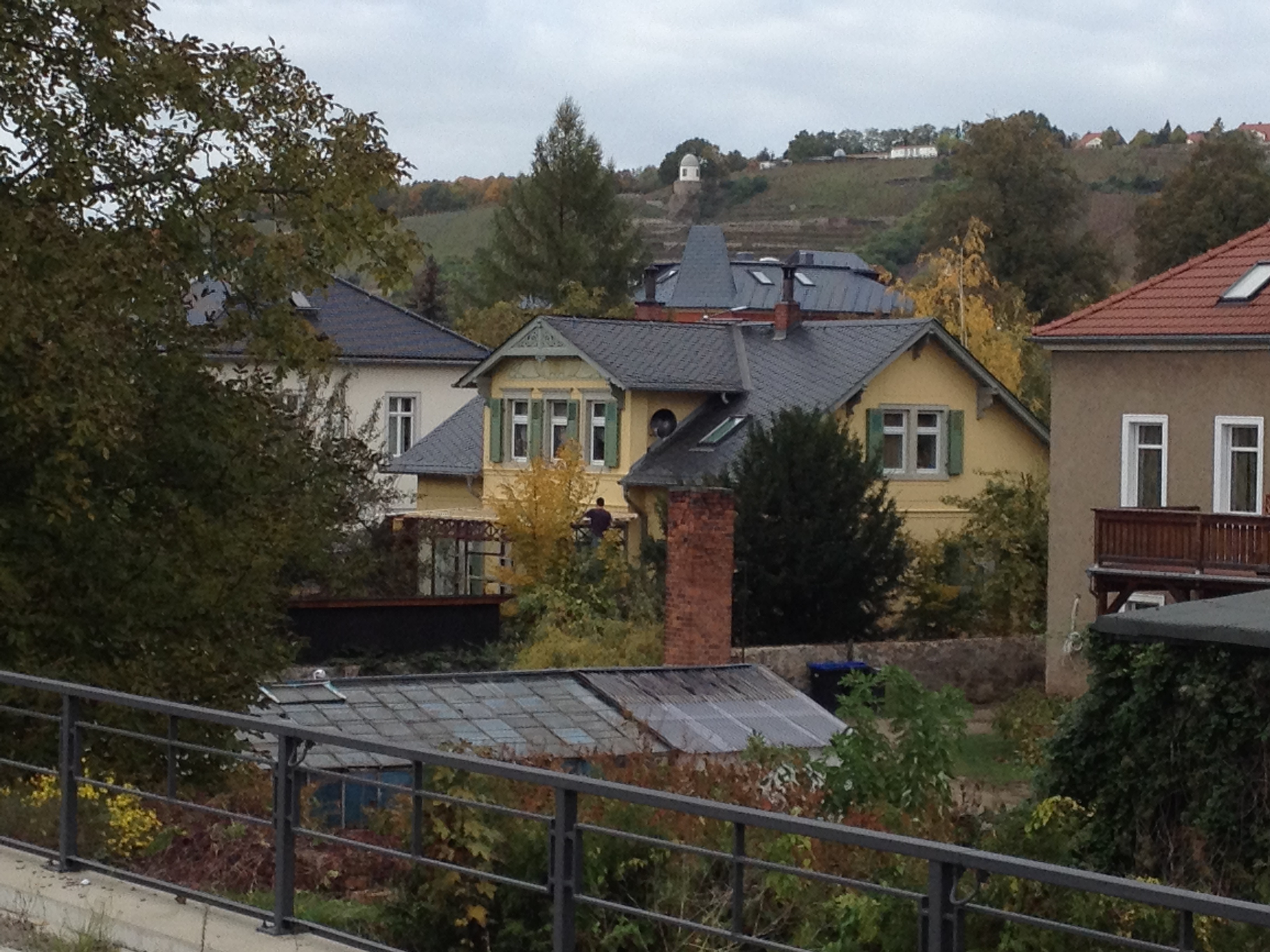 Radebeul-Kötzschenbroda, Villa Carl Traugott Schubert sen., vom Bahnhof Radebeul-Kötzschenbroda aus